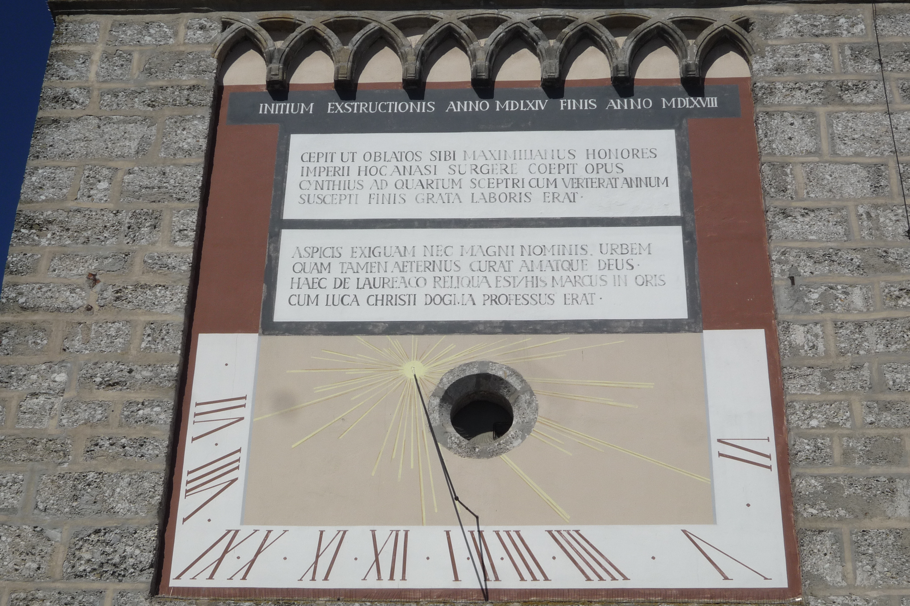 Sonnenuhr und Lateinischer Text